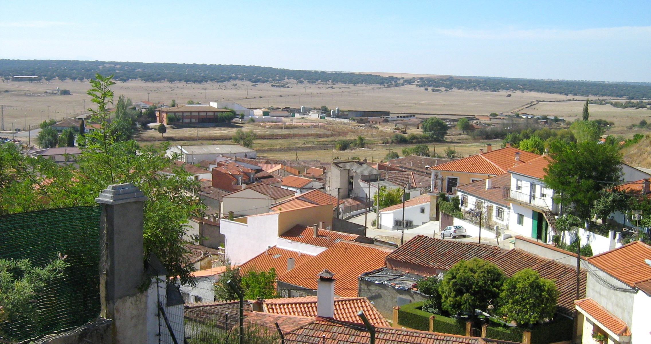 Matilla de los Caños del Río. Salamanca.